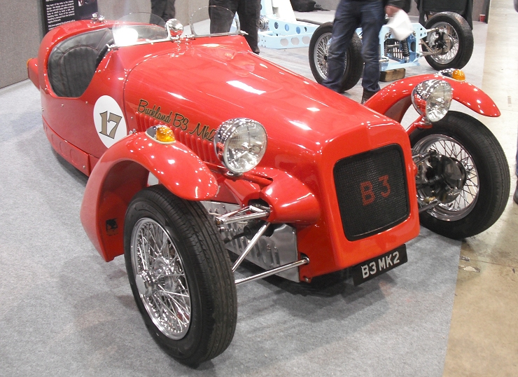 Buckland B3